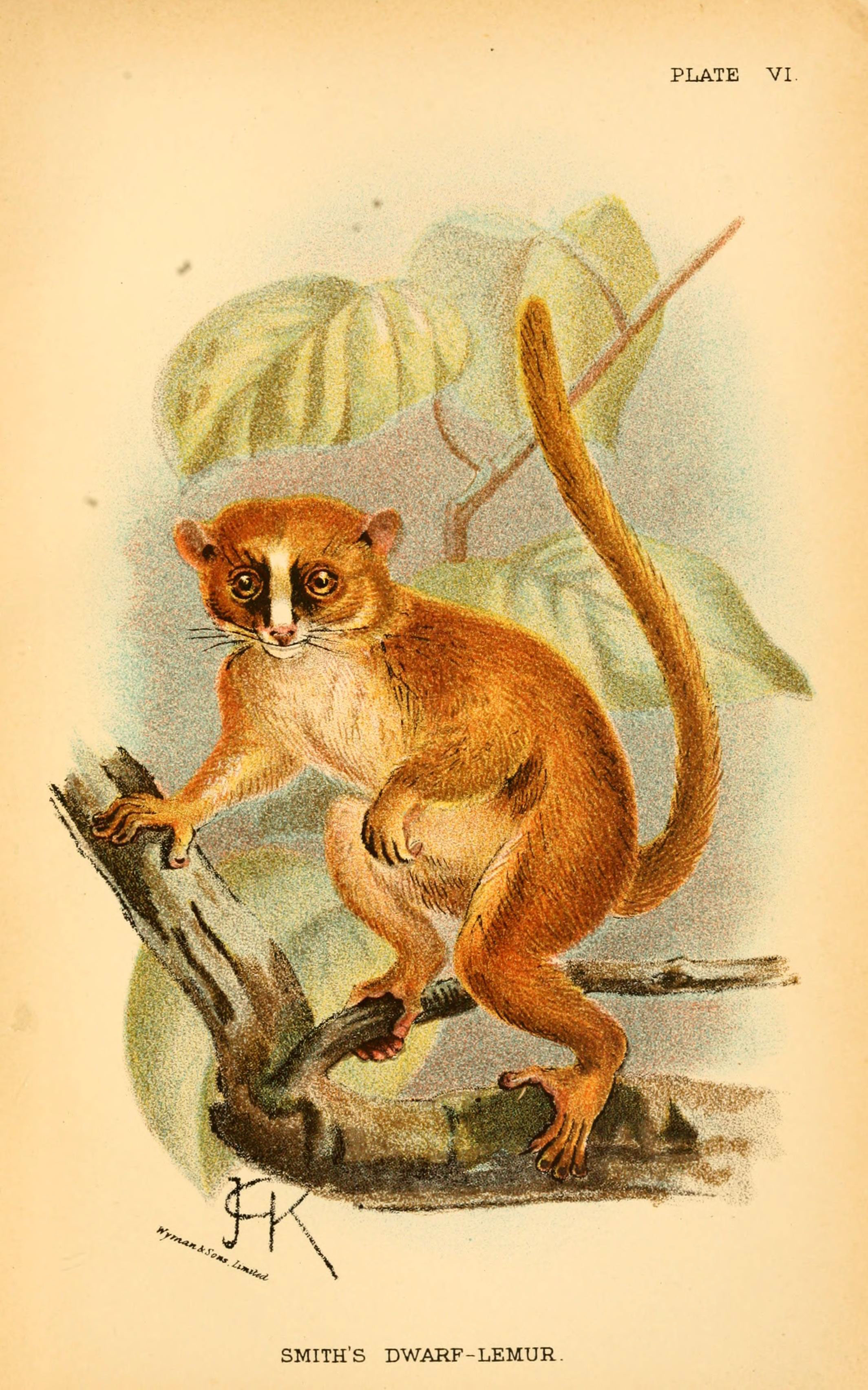 PLATE VI . I. / SMITH'S DWARF-LEMUR.